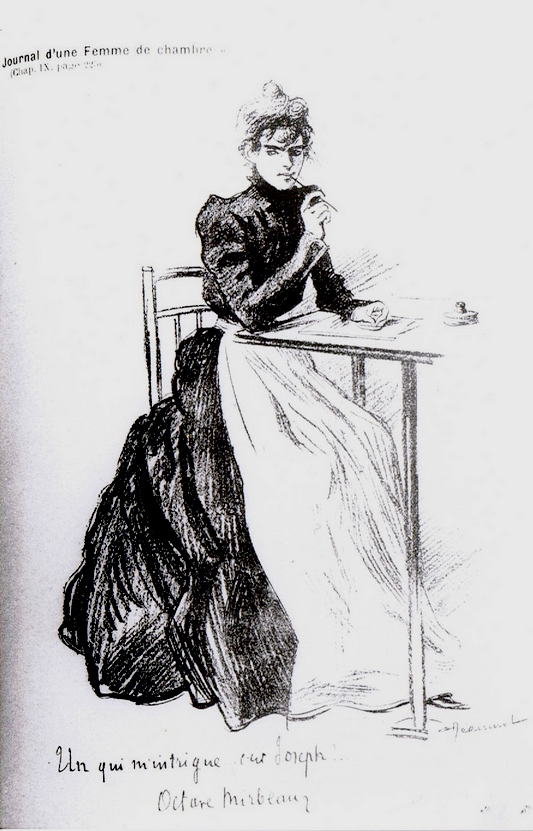 dessin de Georges Jeanniot (1848-1933), illustrant Le Journal d'une femme de chambre, d'Octave Mirbeau (1848-1917)